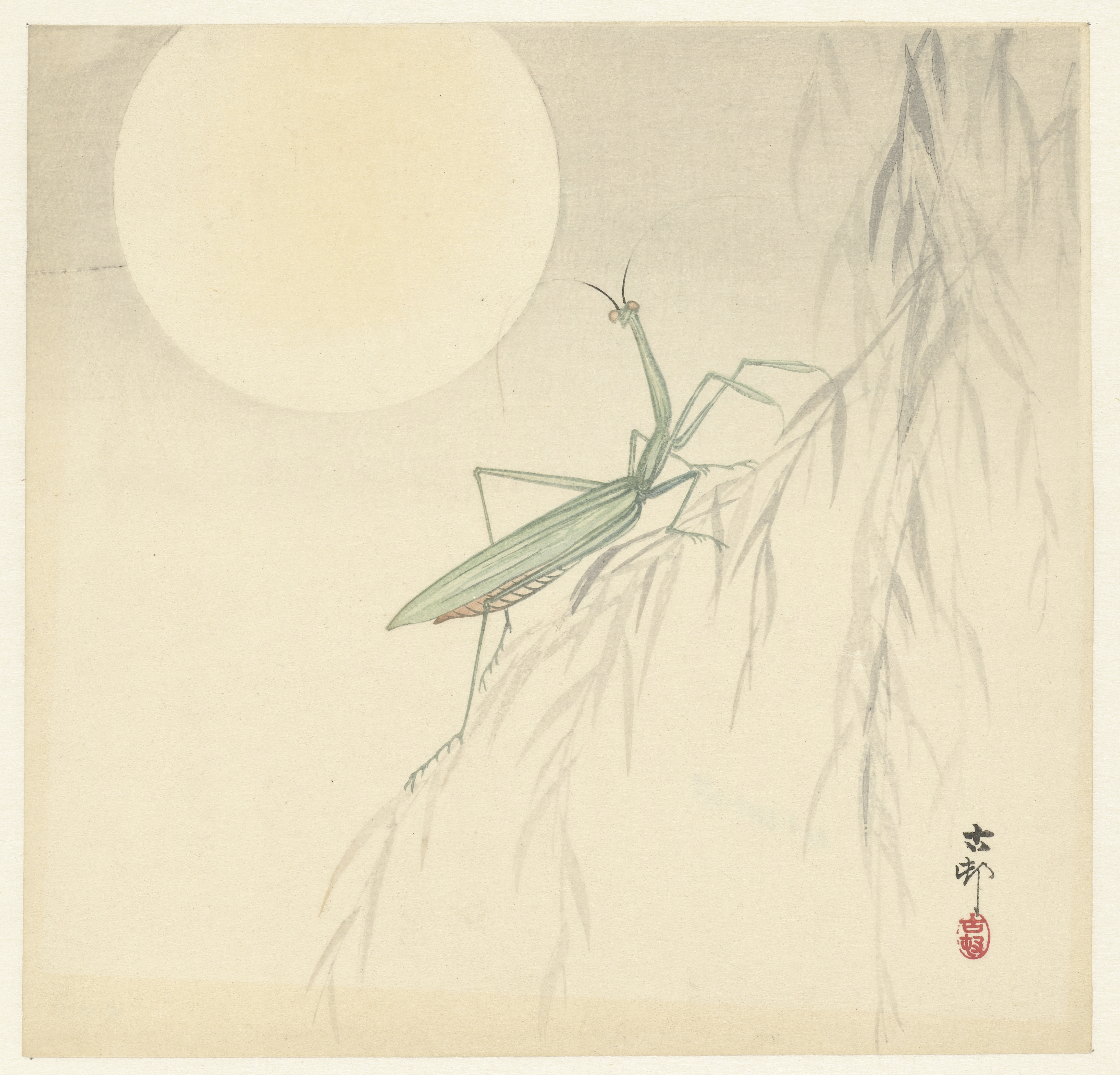 IdentificatieTitel(s): BidsprinkhaanObjecttype: prent Objectnummer: RP-P-2005-488Catalogusreferentie: Newland 40-11Opmerking: KOpschriften / Merken: verzamelaarsmerk, verso, gestempeld: Lugt 2228Omschrijving: Sprinkhaan op wilgentak bij volle maan.VervaardigingVervaardiger: prentmaker: Ohara Koson (vermeld op object)Plaats vervaardiging: JapanDatering: 1900 - 1936Fysieke kenmerken: kleurenhoutsnede; lijnblok in zwart met kleurblokkenMateriaal: papier Techniek: kleurenhoutsnedeAfmetingen: beeld: h 244 mm × b 253 mmToelichtingobjectnaam.bijzonderheden: shikishibanVerwerving en rechtenCredit line: Schenking van de heer J. Perrée, EindhovenVerwerving: schenking 2005Copyright: Publiek domein